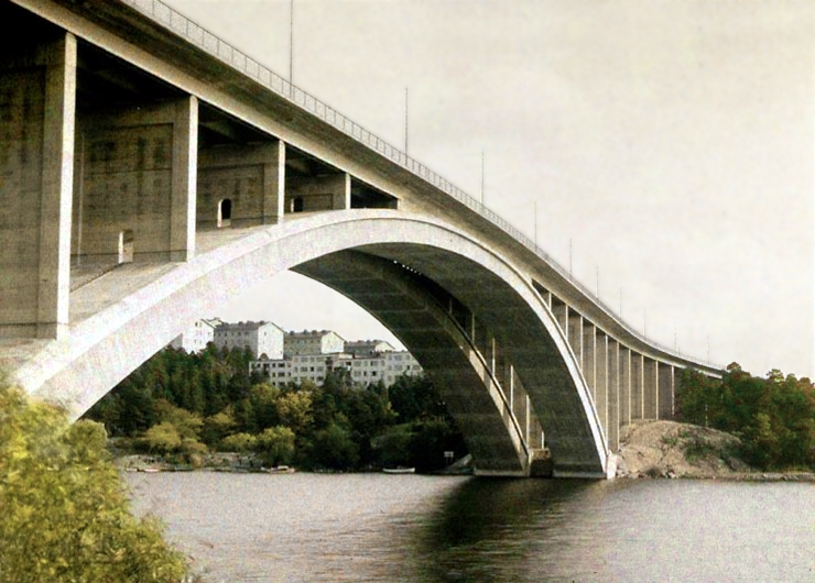 Tranebergsbron i Stockholm omkring 1937. Vy mot Kristineberg. (digitally restored version)